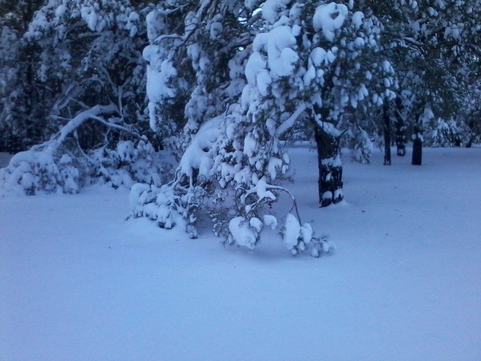 Посаджений людьми ліс